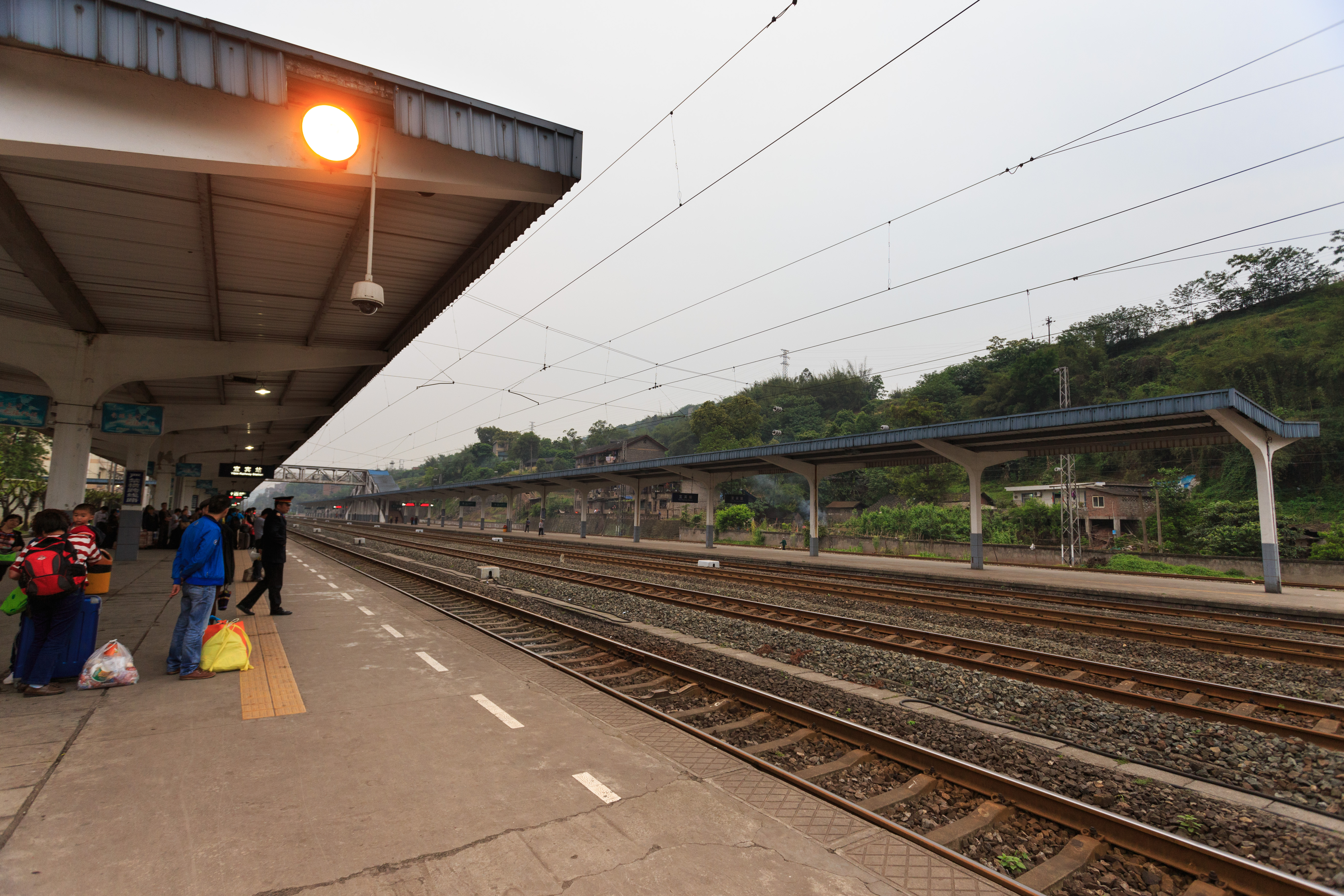 宜宾火车站 站台